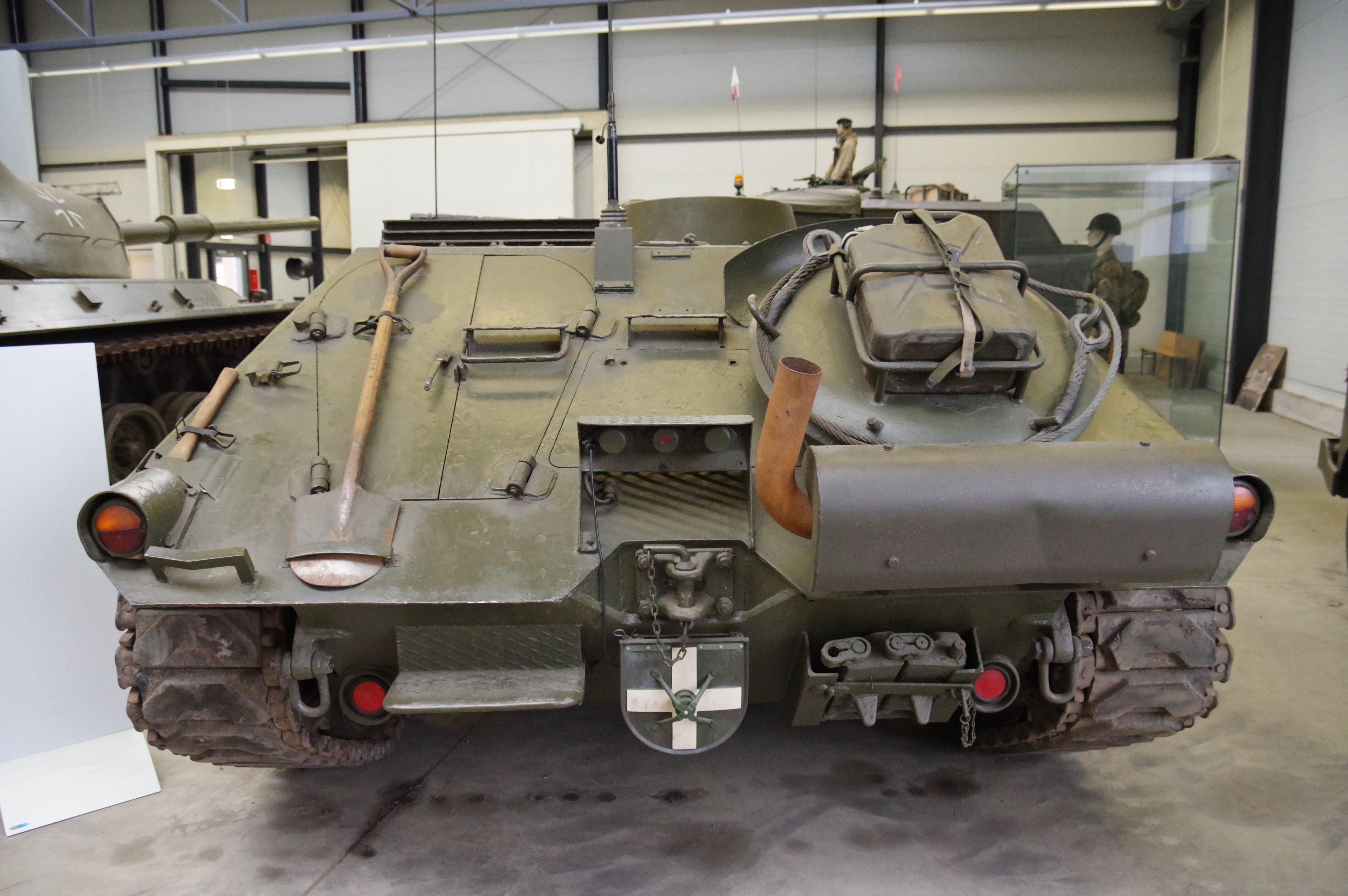 Deutsches Panzermuseum Munster